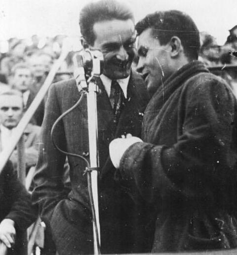 10.Welt-Universitäts-Sommerspiele, Csik im Interview Die 10.Welt-Universitäts-Sommerspiele in Ungarn-Am 21.August 1949 fanden die 10.Hochschul-Sommerspiele, an denen über 900 Sportler teilnahmen, ihren Abschluß.Die größte Zahl der Meistertitel gewannen die Teilnehmer der Sowjet-Union.Obwohl sie nur in acht von 13 Sportarten mitwirkten, sicherten sie mit 48 Titeln den ersten Platz für ihr Land in der Gesamtwertung.Die ungarischen Sportler und Sportlerinnen behaupteten mit 46 den 2.Platz vor Frankreich mit 14 Siegen.UBz: Csík, der Boxmeister im Bantam-Gewicht, gibt ein Rundfunk-Interview.Foto:Illus Der Reporter auf dem Photo ist György Szepesi (* 1922), Ung. Radio- und Fernsehen).